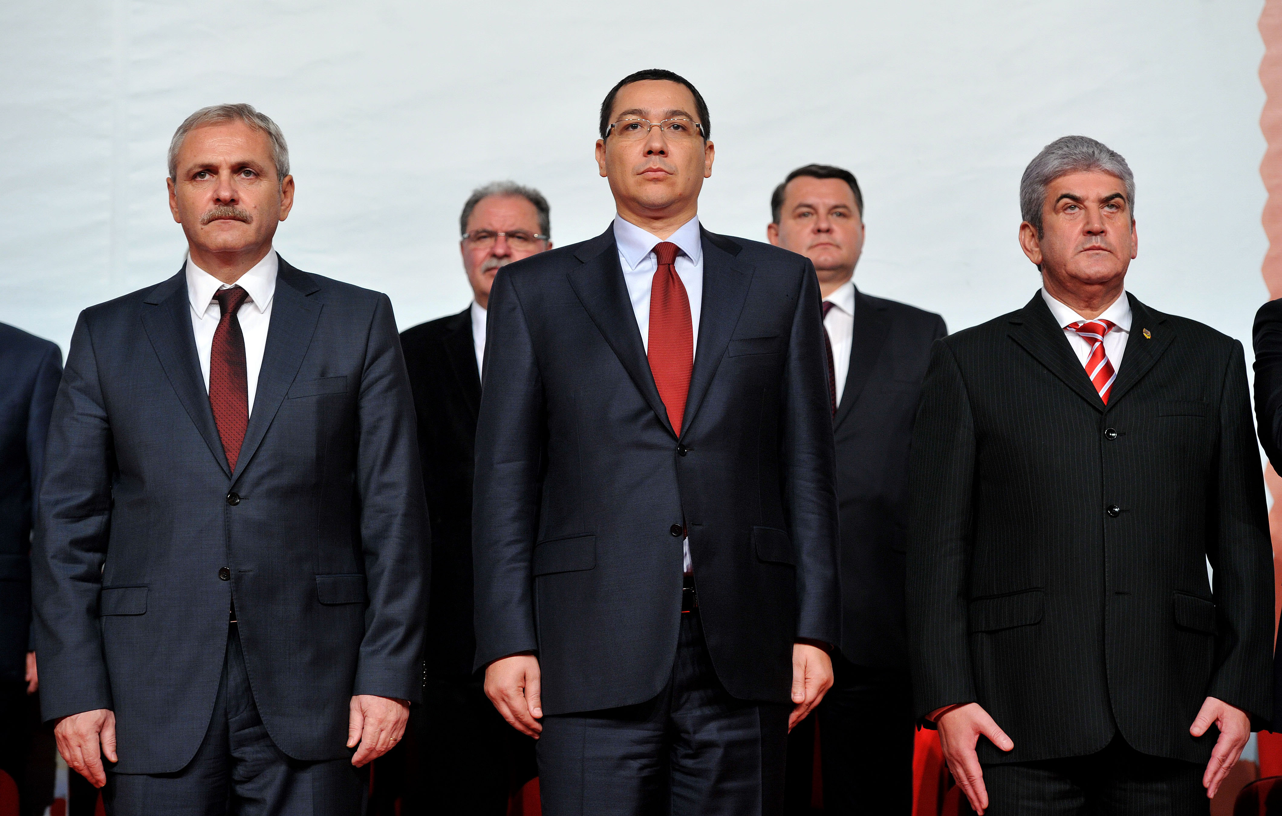 Victor Ponta si Liviu Dragnea la Liga Alesilor Locali ai PSD, Palatul Parlamentului